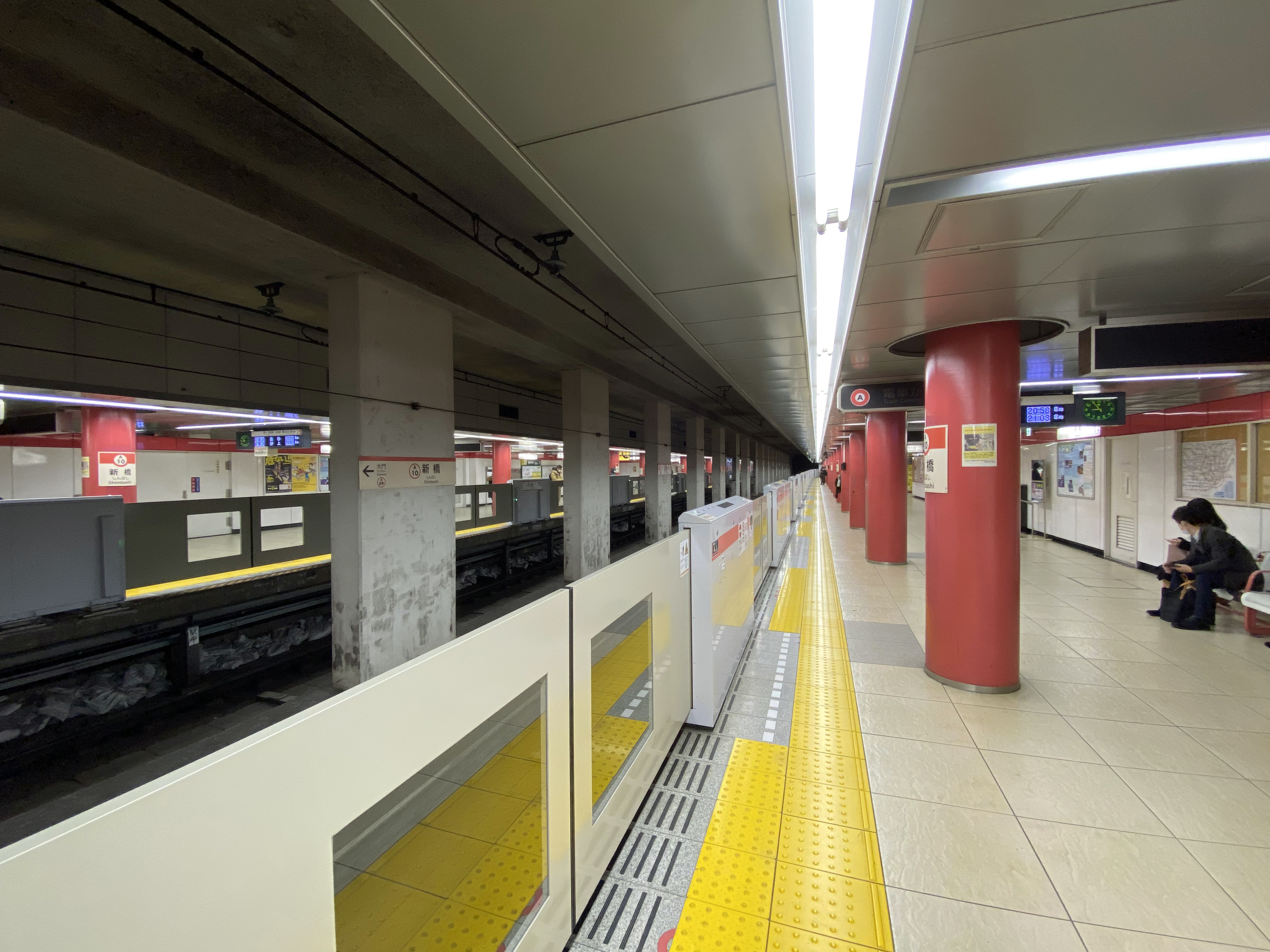 Shimbashi Station Asakusa Line Platform